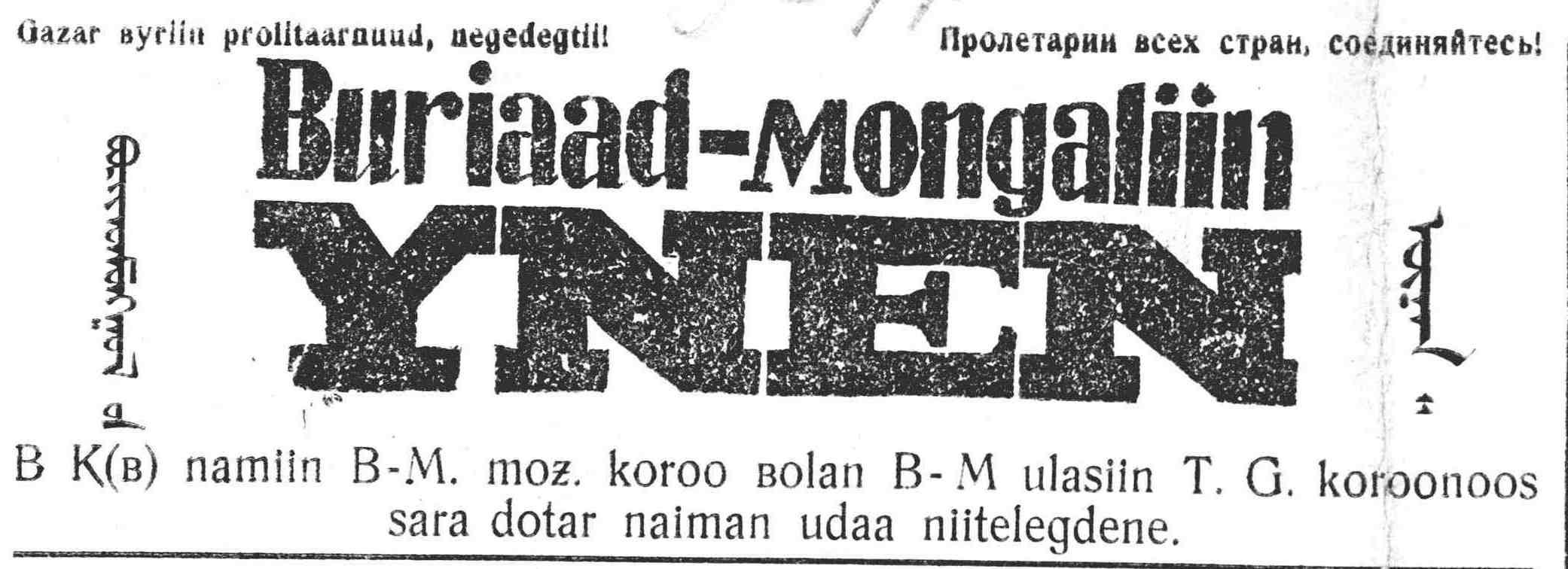 Буряад: Буряад үнэн сониной нюур хуудаһан